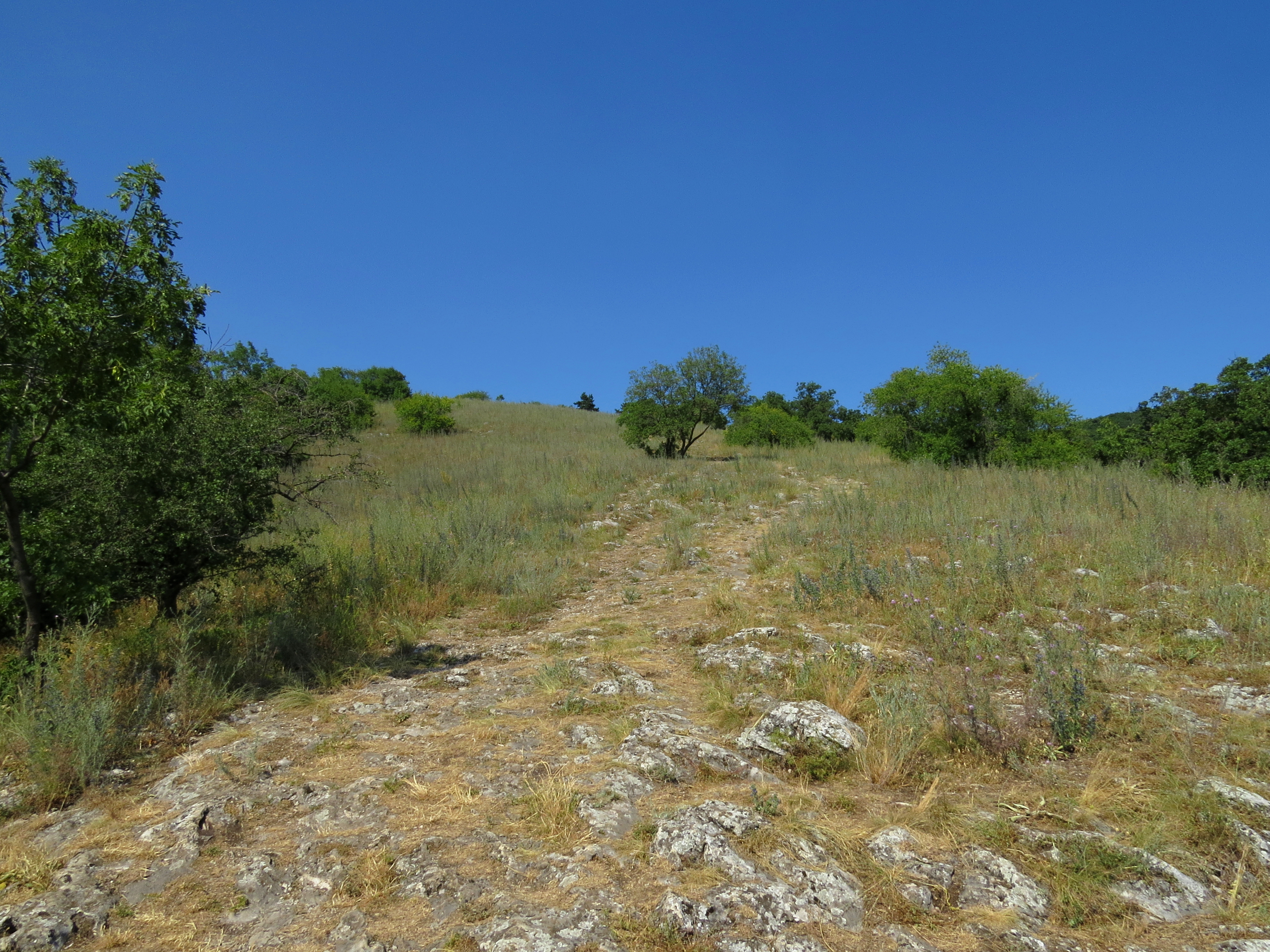 Zoborská lesostep - pohled na lokalitu